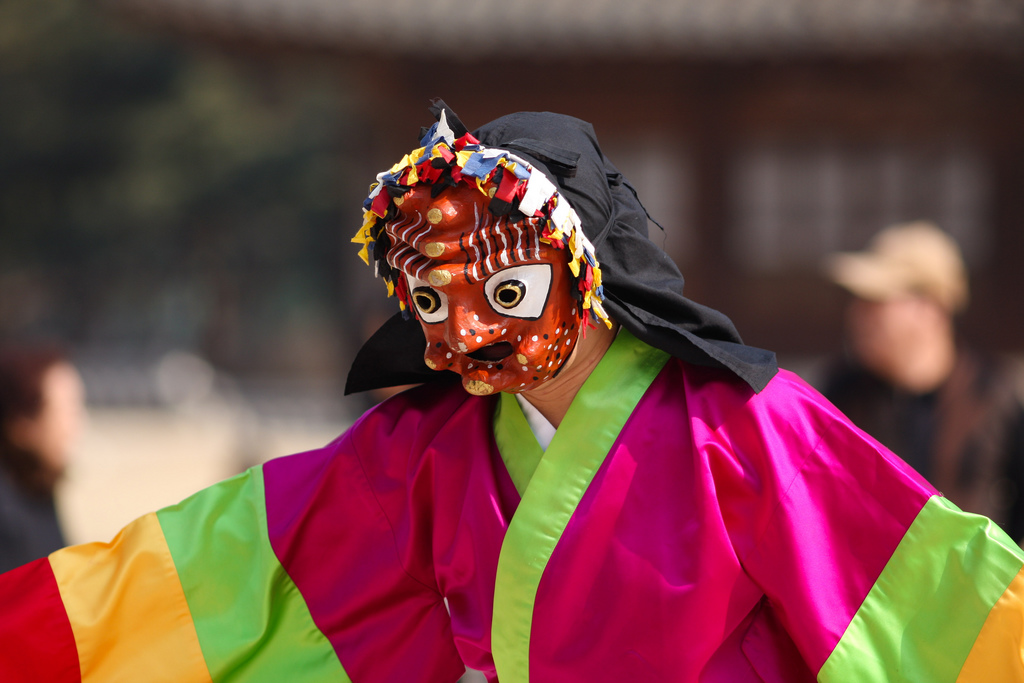 Talchum, a Korean mask dance